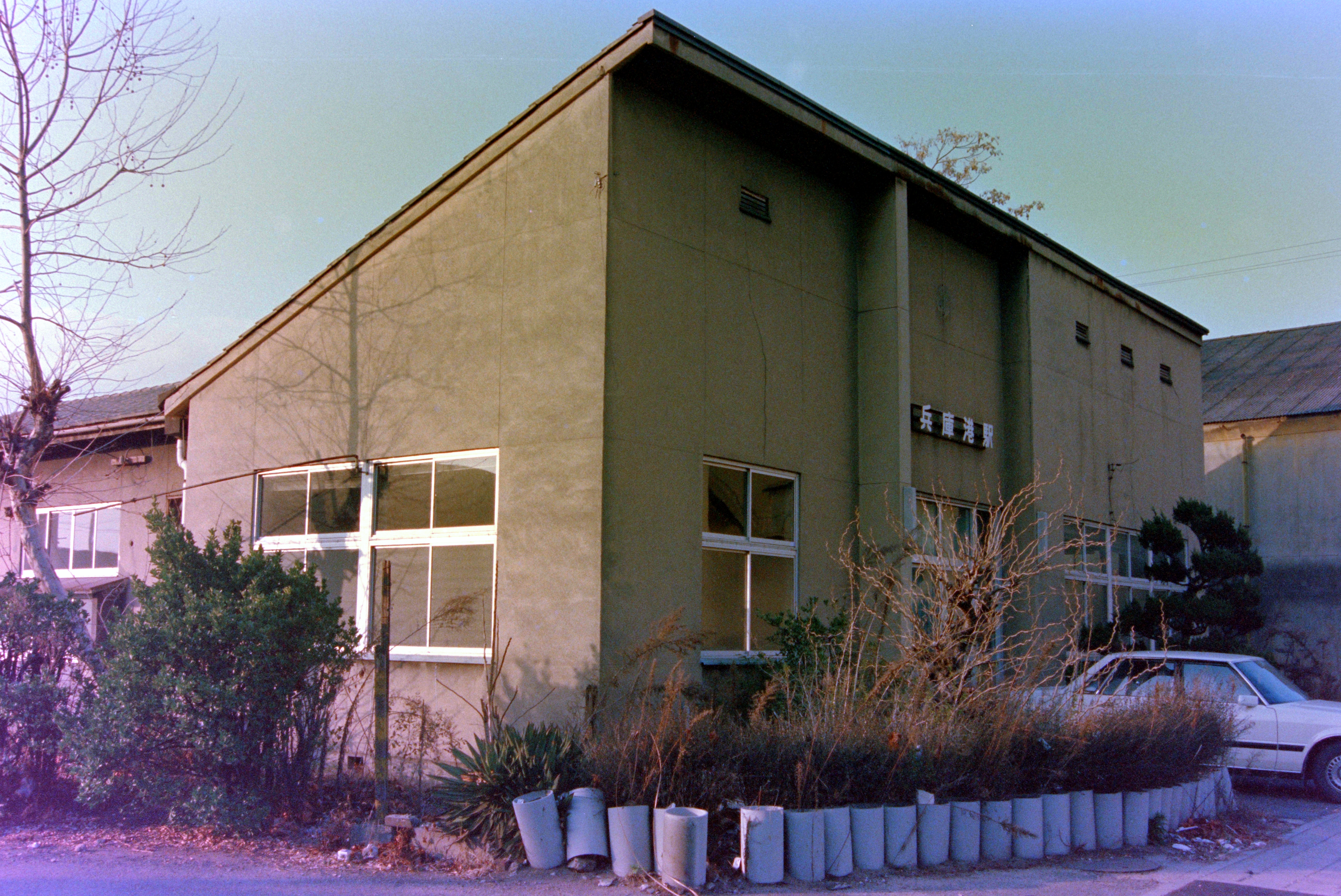 廃止一年後の日本国有鉄道山陽本線貨物支線・兵庫港駅駅舎